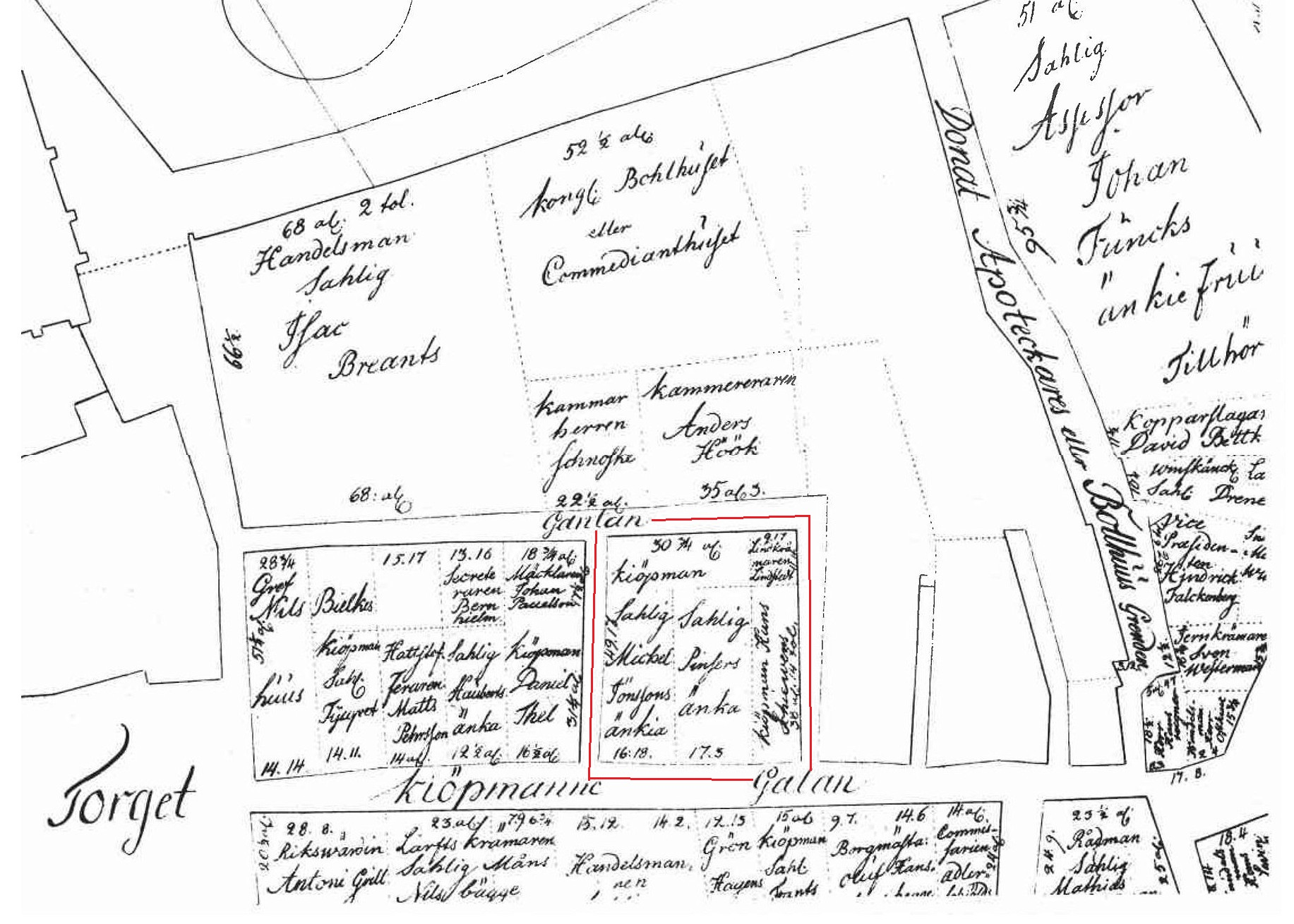 Tomtkarta för kvarteret Pygmalion (i röd ram) omkring år 1700